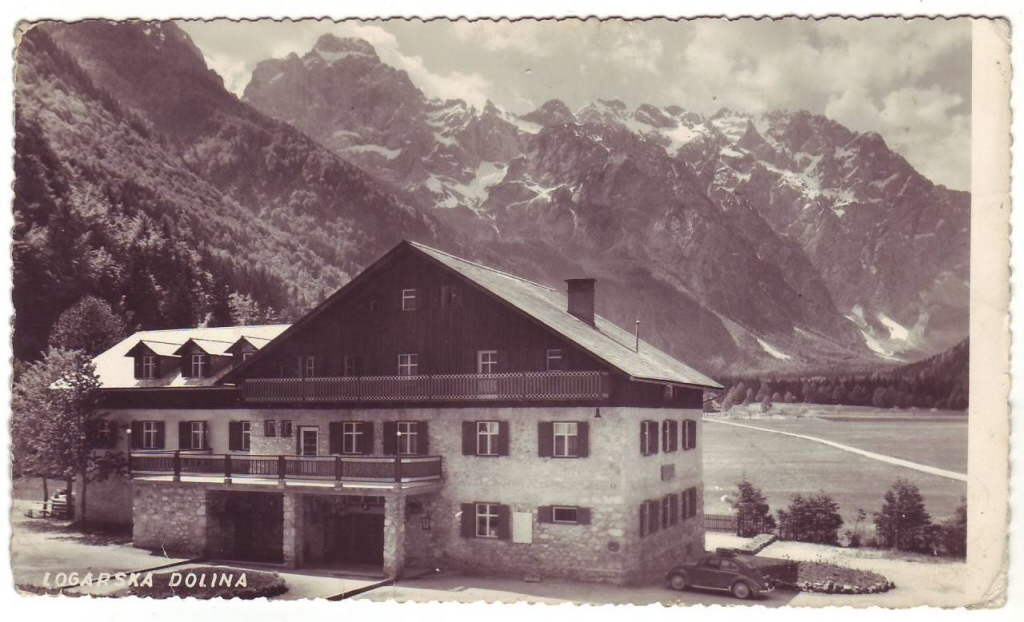 Razglednica Hotela sester Logar